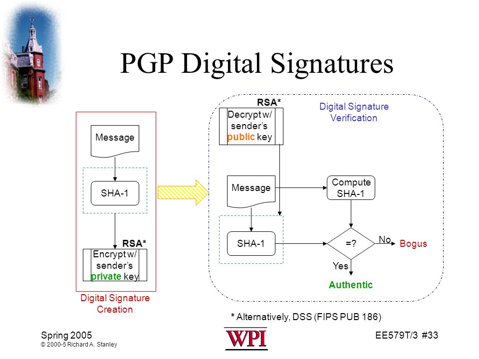 Монгол: pgp зураг